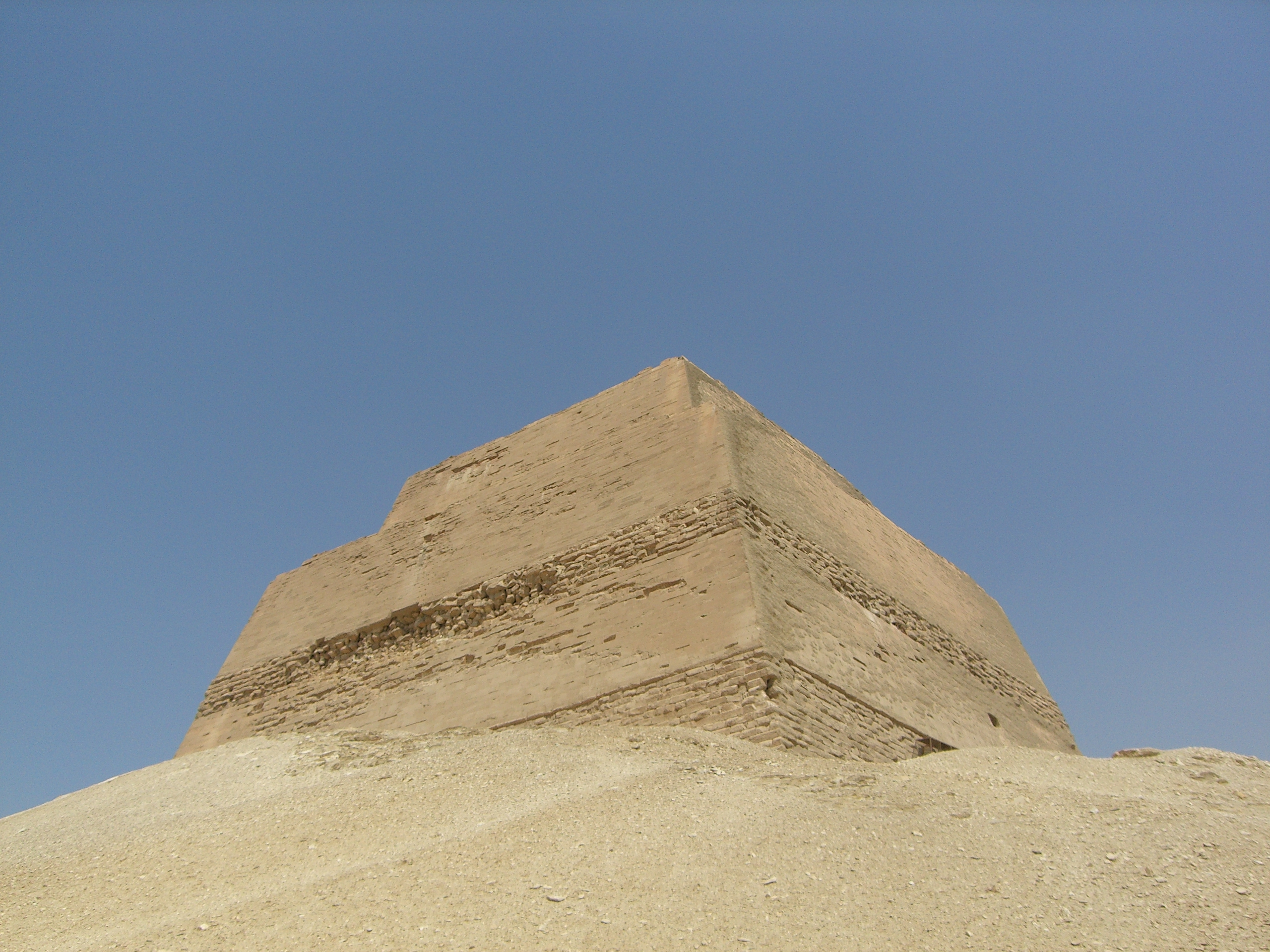 Vue de l'angle sud-est de la pyramide de Meïdoum.